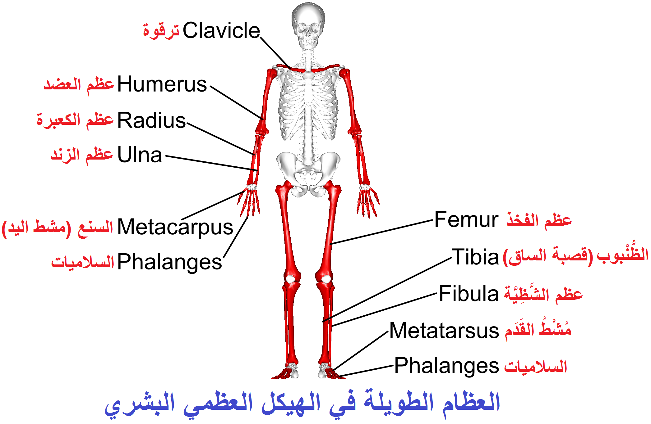 العظام الطويلة في الهيكل العظمي البشري Long Bones in Human Skeleton